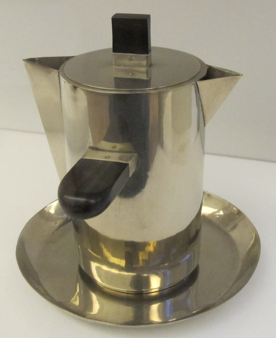 Wilhelm wagenfeld, fett-mager-sauciere (MT 50), 1924